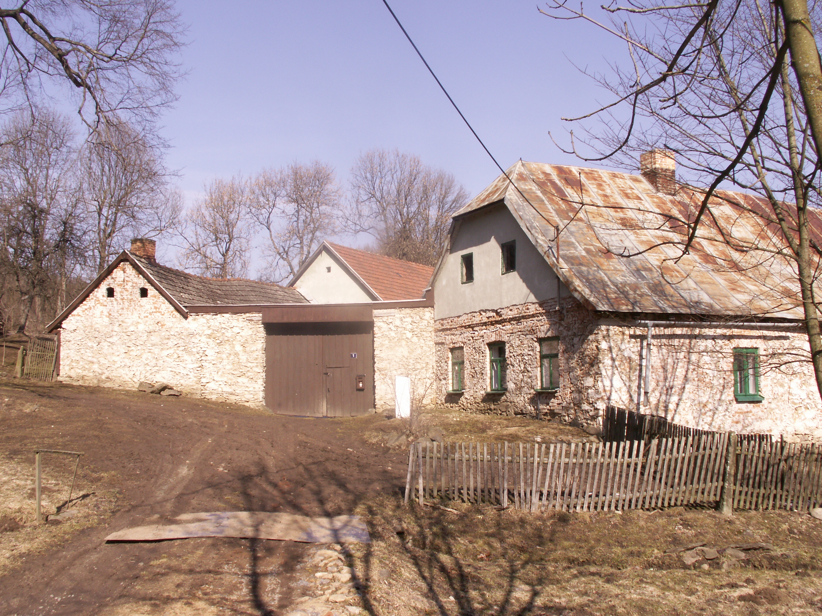 dům čp. 1 Starý Telečkov, okres Žďár nad Sázavou, kraj Vysočina